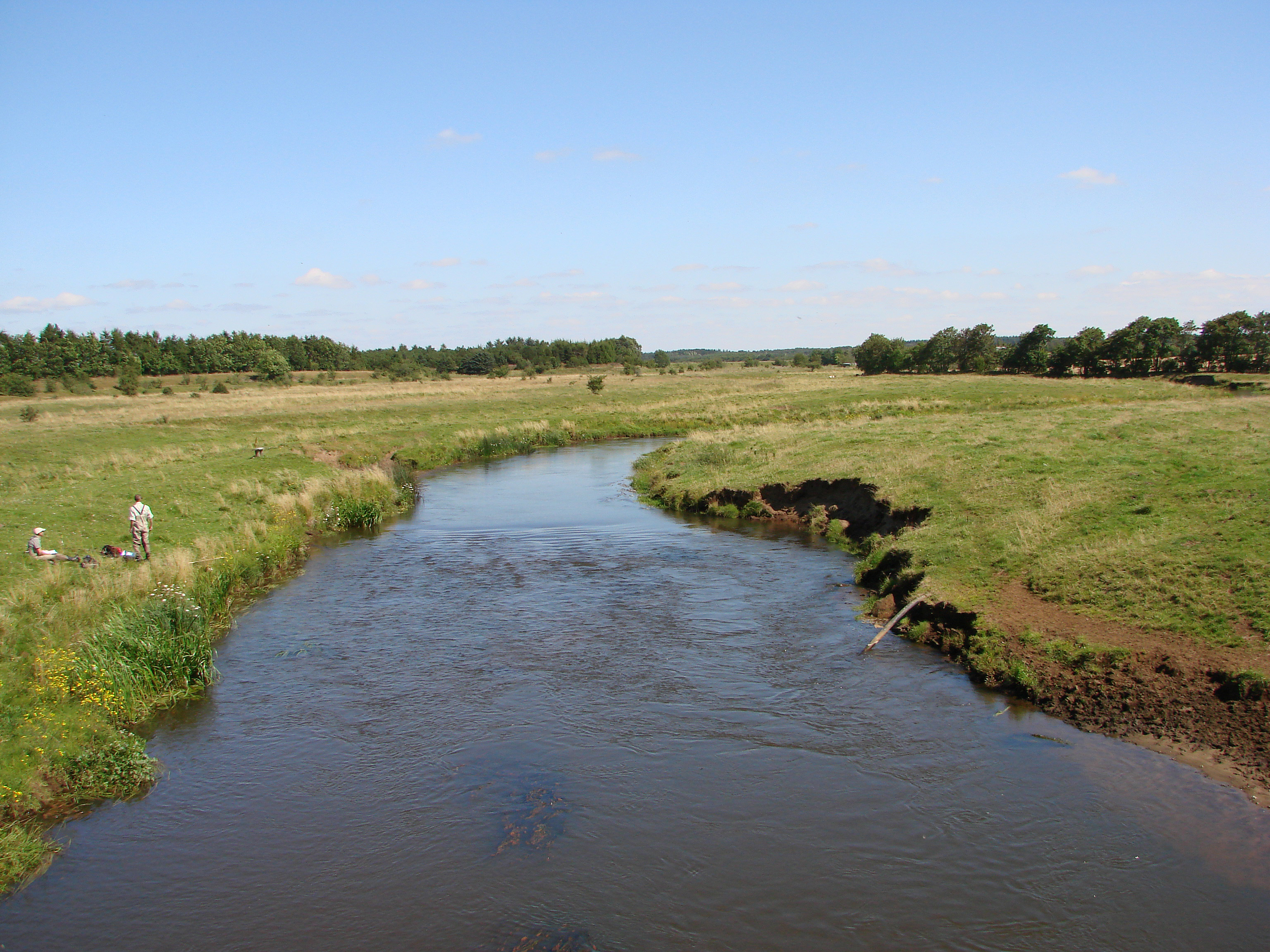 Vorgod Å set mod nord, fra landevejen ved udløbet